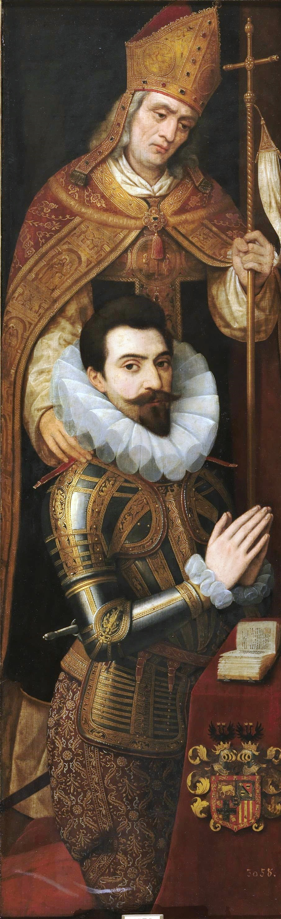 Retrato del aristócrata y militar español Alonso de Idiáquez de Butrón y Múgica (1565-1618), primer duque de Ciudad Real, virrey de Navarra y comendador mayor de León en la Orden de Santiago.